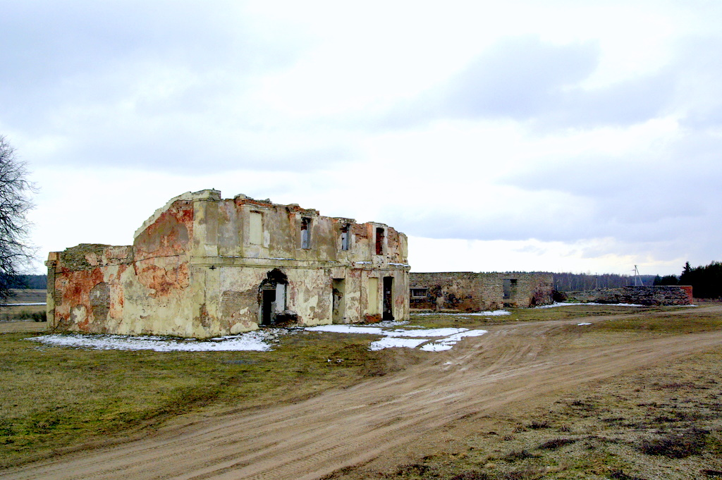 Laagna mõisa abihoonete varemed